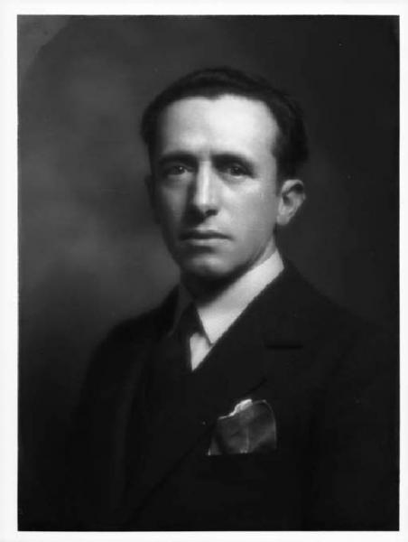 Arch. Giovanni Greppi (1884-1960), ritratto fotografico, 1931